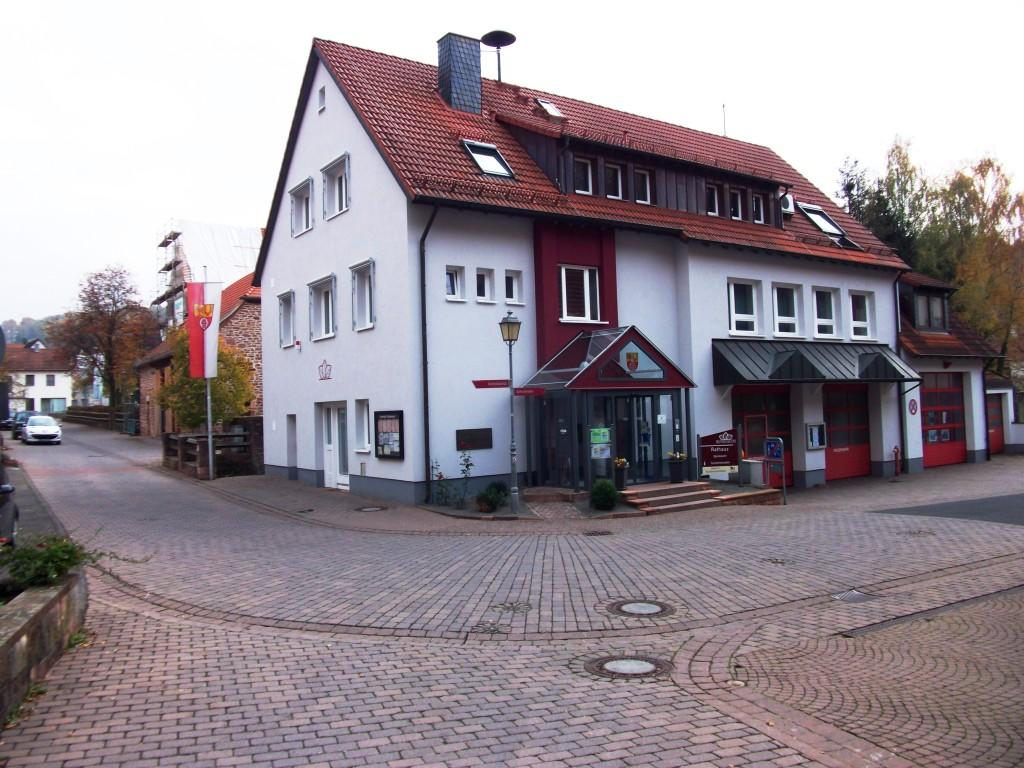 Rathaus mit Feuerwehr in Rothenbuch